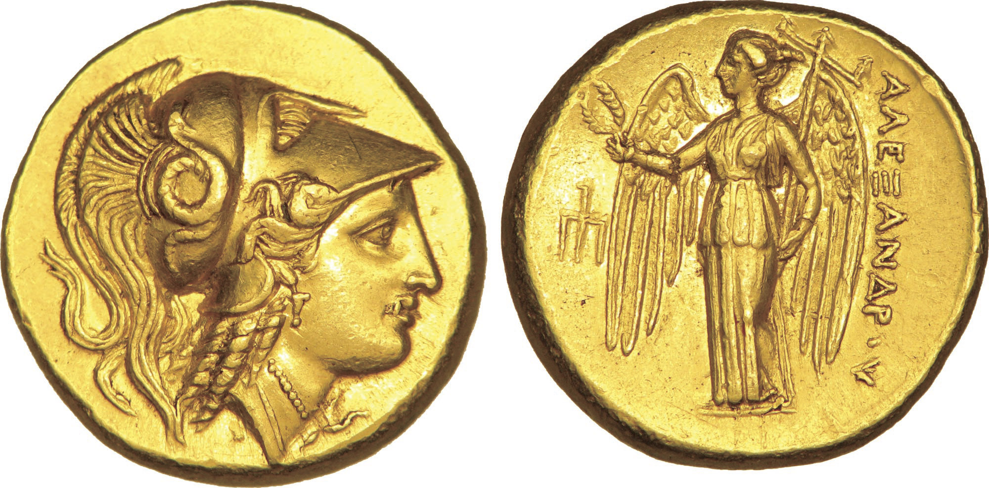 Nom de l'atelier : Macédoine, Amphipolis Métal : or Diamètre : 22mm Axe des coins : 10h. Poids : 17,29g. Titulature avers : Anépigraphe. Description avers : Tête casquée d'Athéna à gauche, coiffée du casque corinthien à aigrette, orné d'un serpent ; les cheveux tombant sur la nuque en mèches torsadées et séparées. Description revers : Niké debout à droite, les ailes déployées, tenant de la main droite une couronne et de la gauche la stylis ; dans le champ à gauche, une tête de trident posée verticalement la tête en bas. Légende revers : ALEXANDR.U Traduction revers : (d’Alexandre).